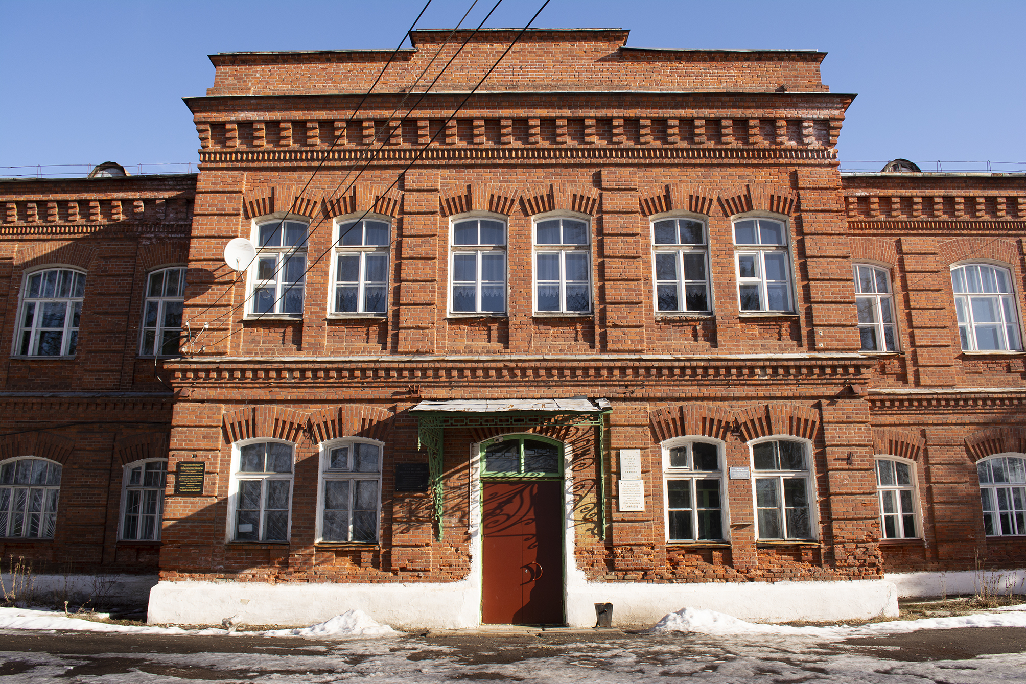 Макарьевское ПТУ им. Юрия Смирнова. Бывшее ремесленное училище Ф.В Чижова